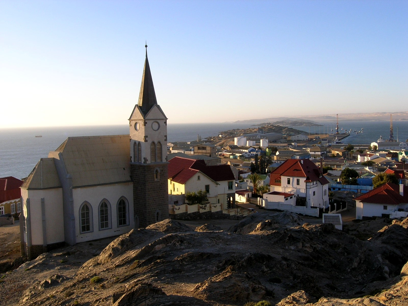 Luderitz, Stadt mit Felsenkirche